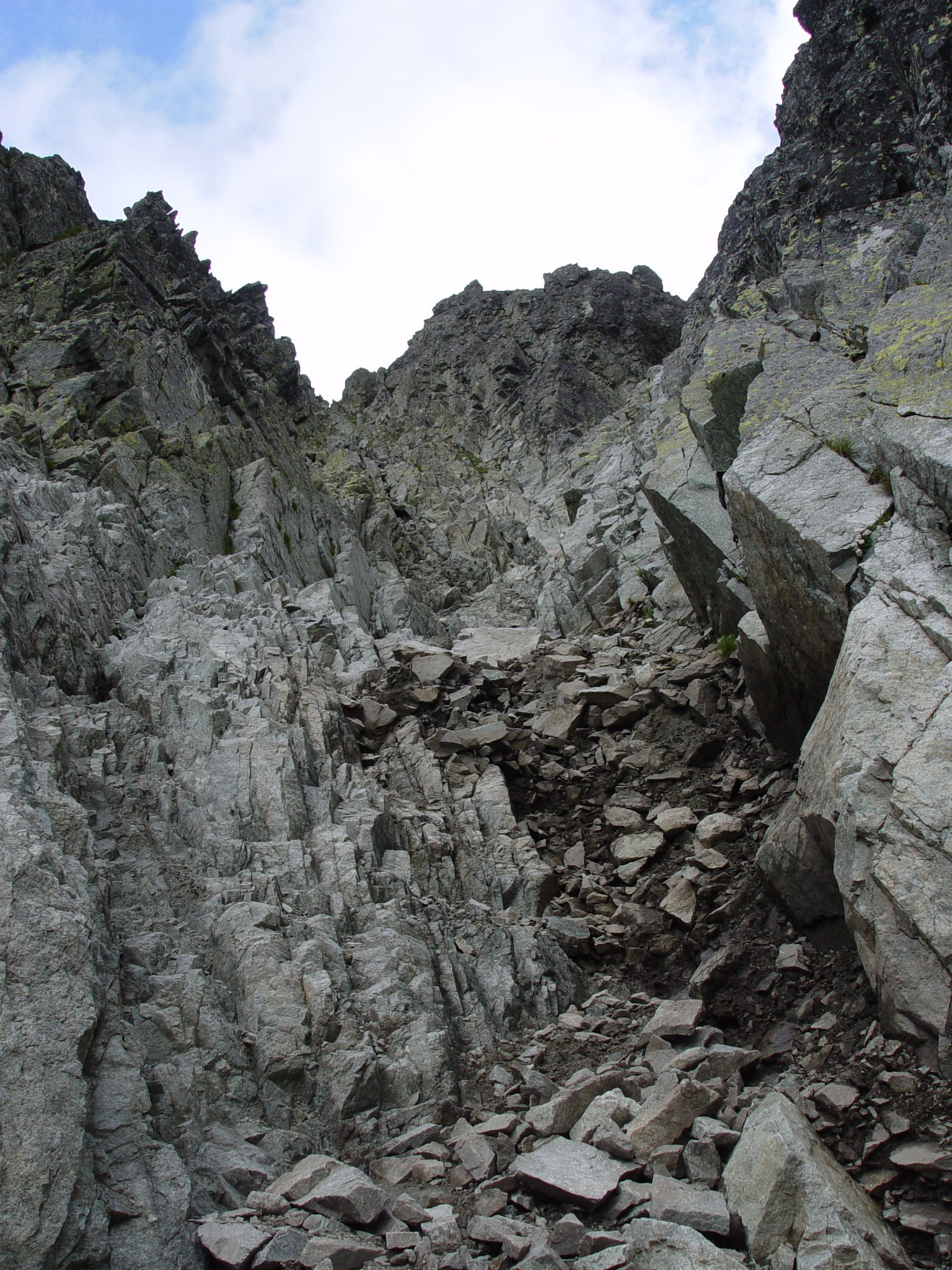 Magas-Tátra,_Rovátkáról_lefelé